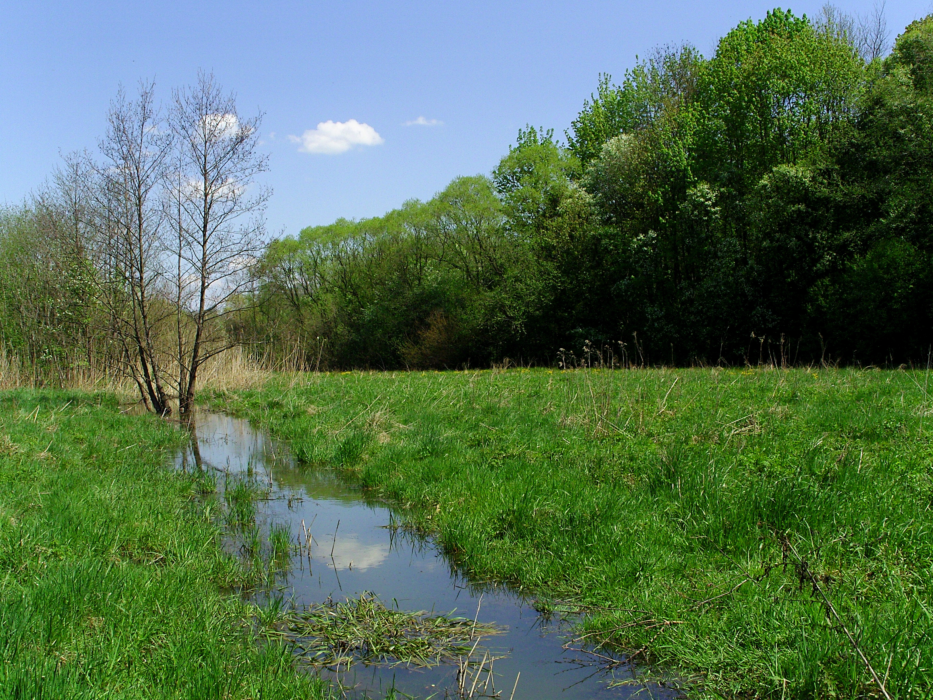 Młynówka (obszar chroniony w ramach projektu Natura 2000) - Łąki nad Młynówką w Bączalu Dolnym